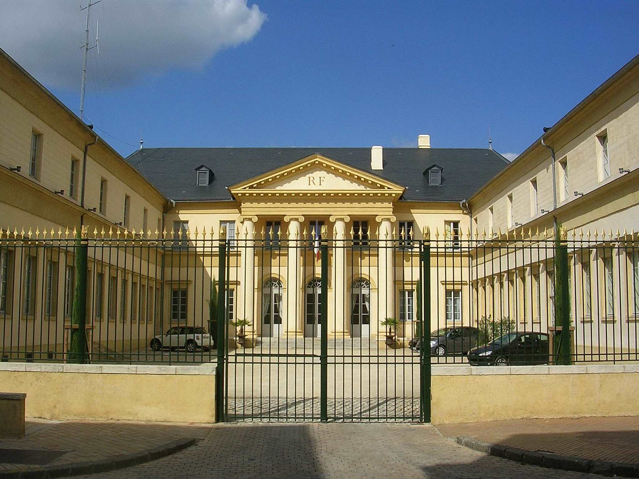 Préfecture des Landes à Mont-de-Marsan (France)